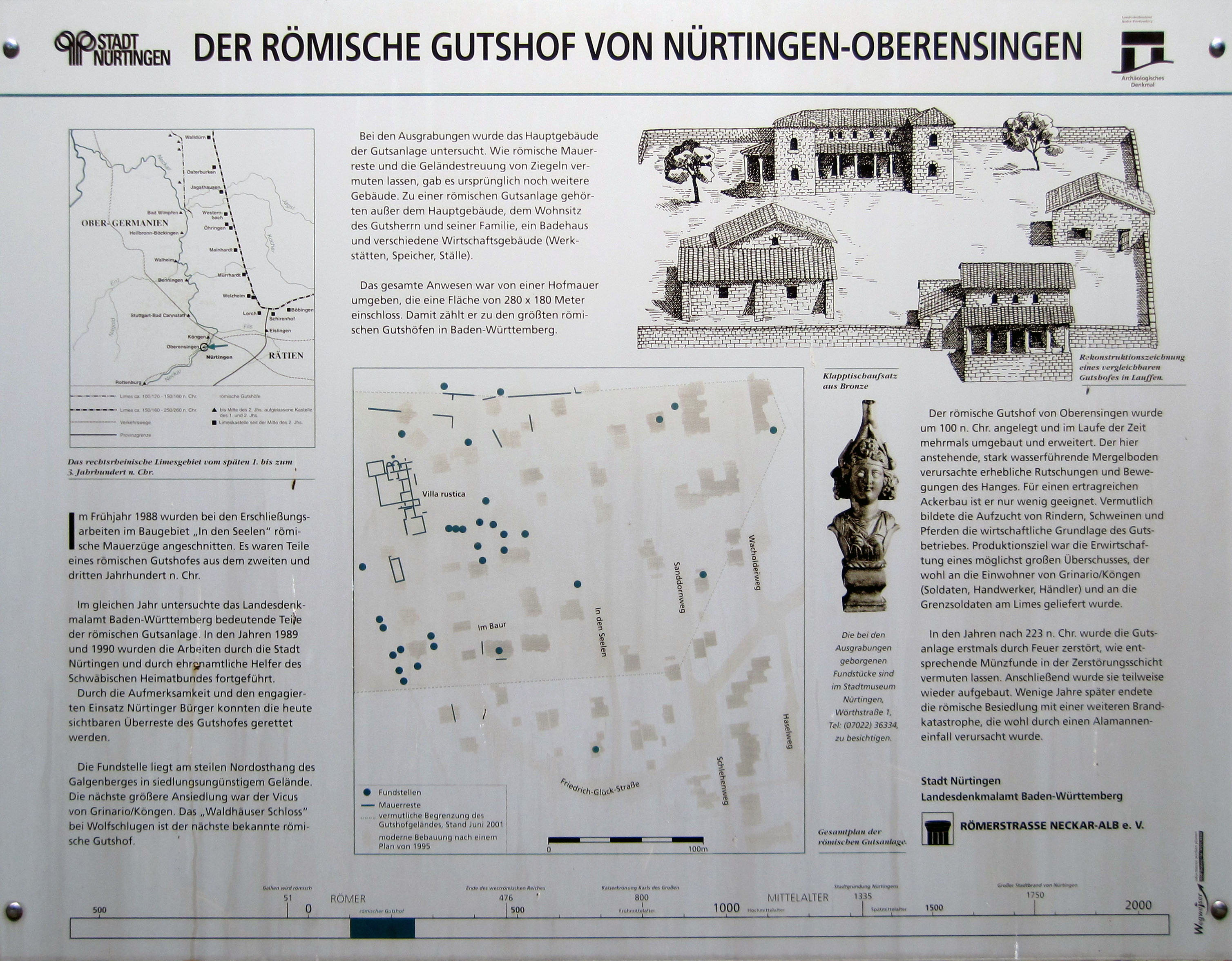 In D-72622 Nürtingen-Oberensingen ausgegrabene Überreste eines römischen Gutshofs (Villa Rustica), um 100 n. Chr.